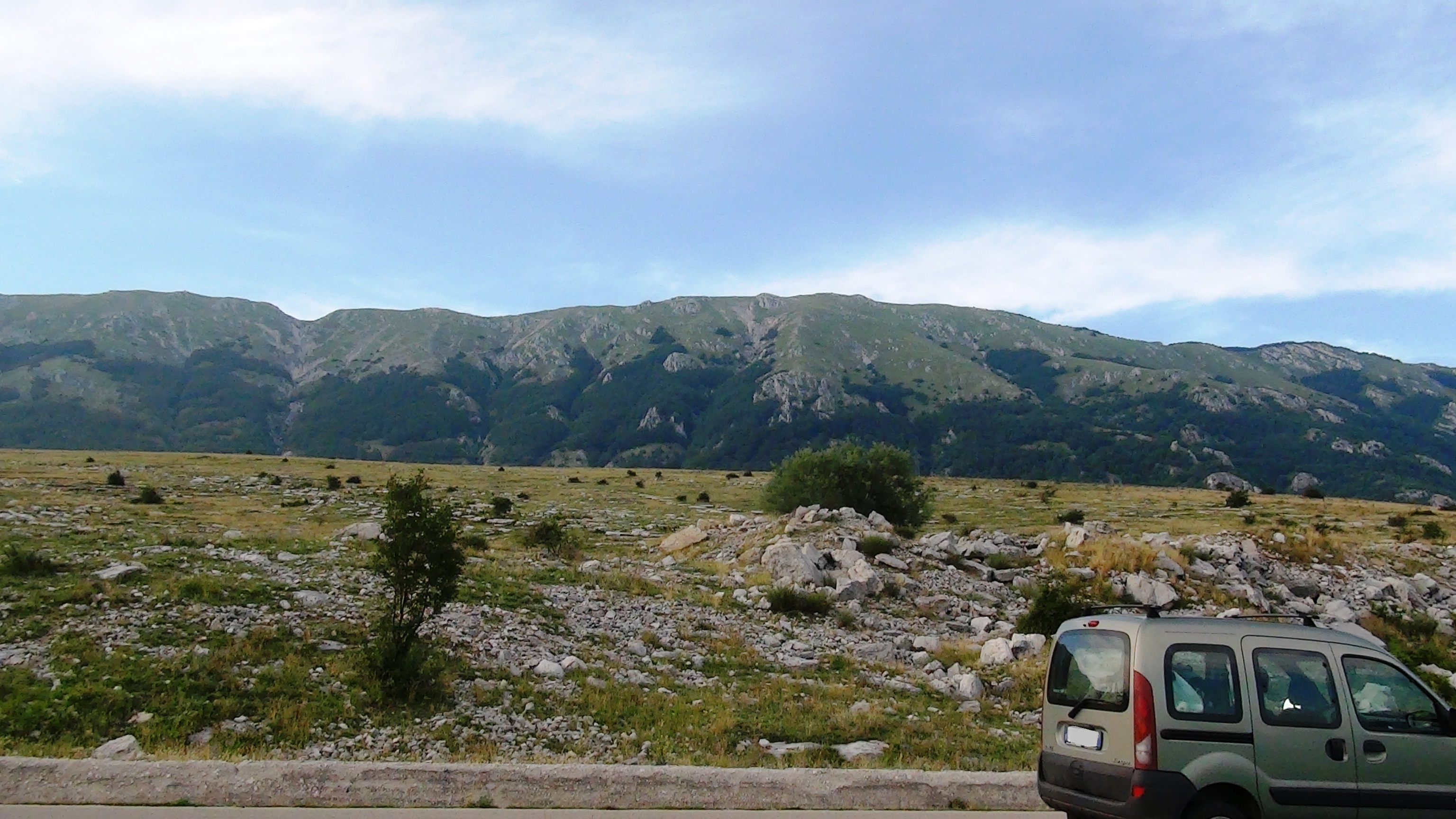 Il Monte Mutria visto dalla Strada Provinciale Cerreto Sannita - Bocca della Selva.